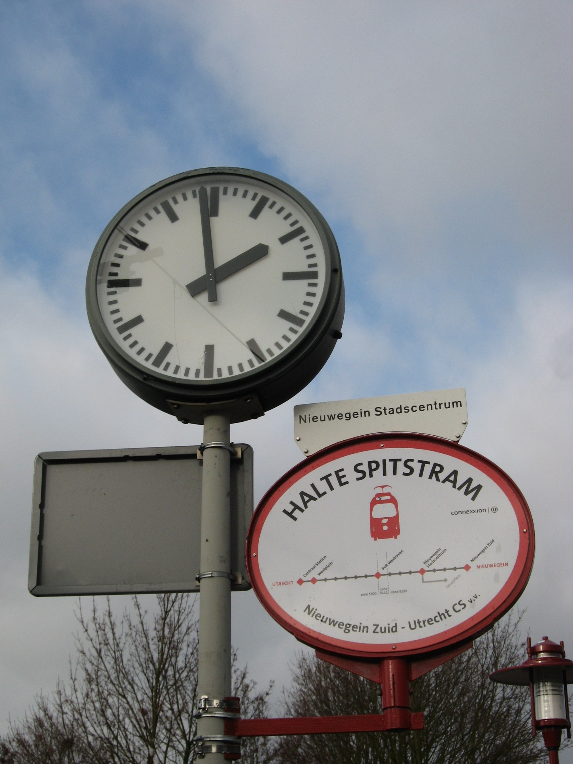 Special haltebord voor de express spitsdienst bereden door ex-Weense trams. Daarom is het ook Weense stijl trambord.